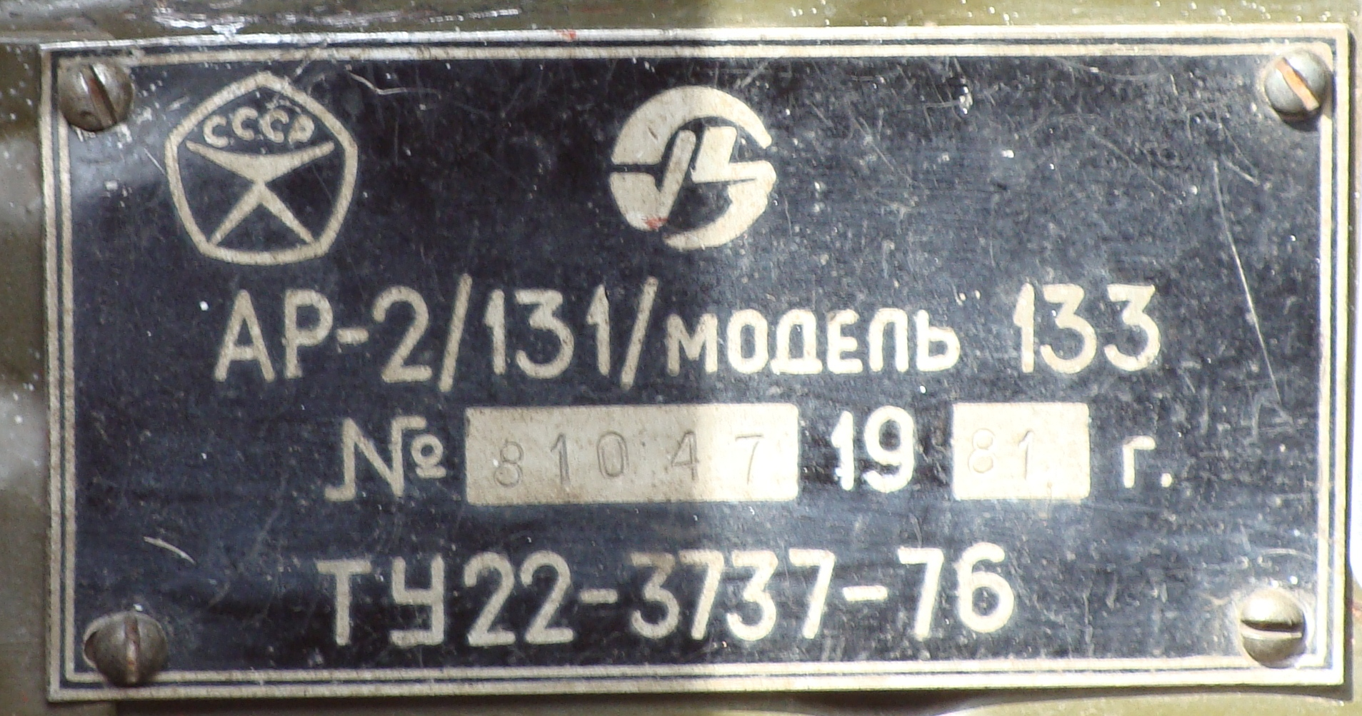 Шильдик АЦ производства Пожтехника-Поморье ПЧ-33, Коряжма